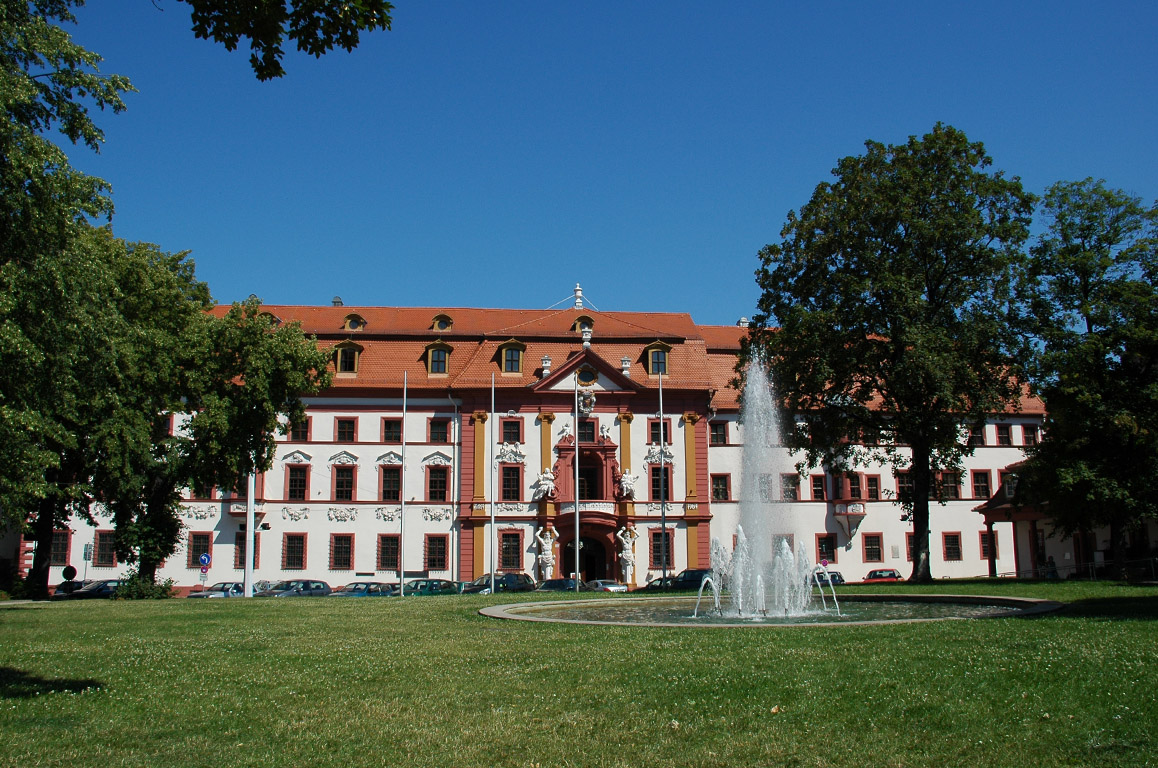 Kurmainzische Statthalterei (zwischen 1711 und 1720 errichtet), heute Sitz der Thüringer Staatskanzlei in der Regierungsstraße in Erfurt